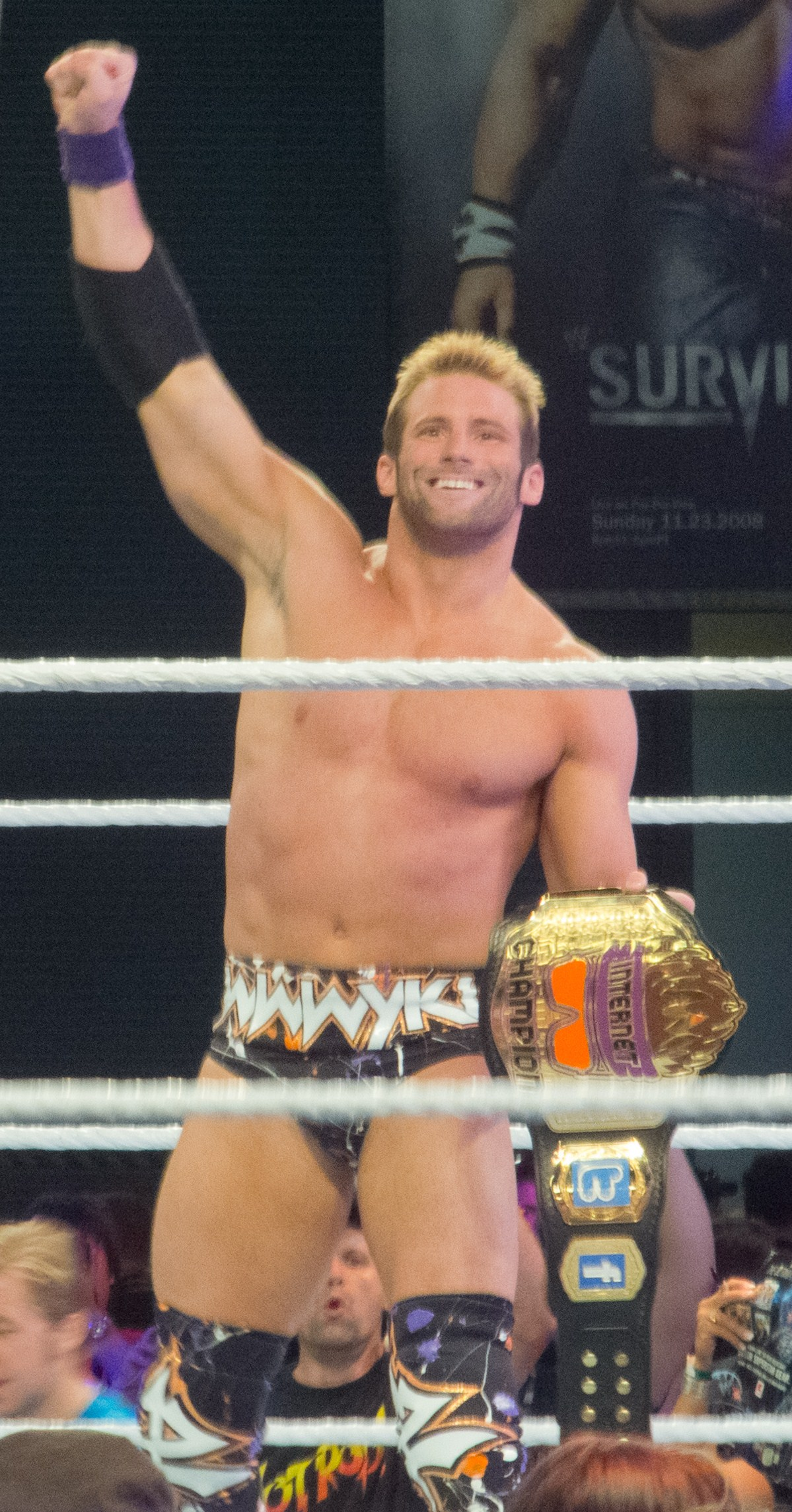 Zack Ryder @ Axxess